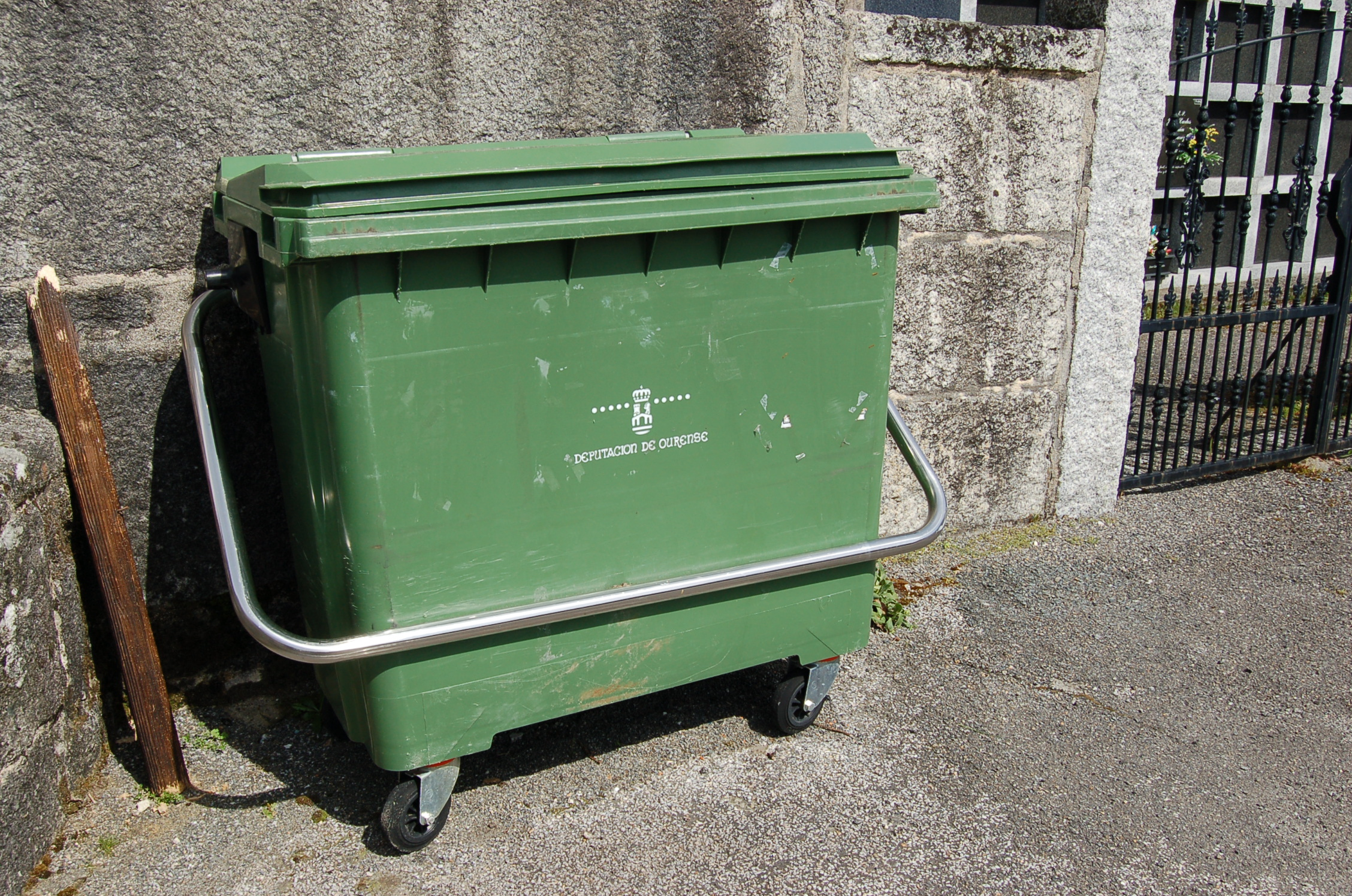 Contedor do lixo da Deputación de Ourense en Barroso, Avión, a carón da igrexa parroquial